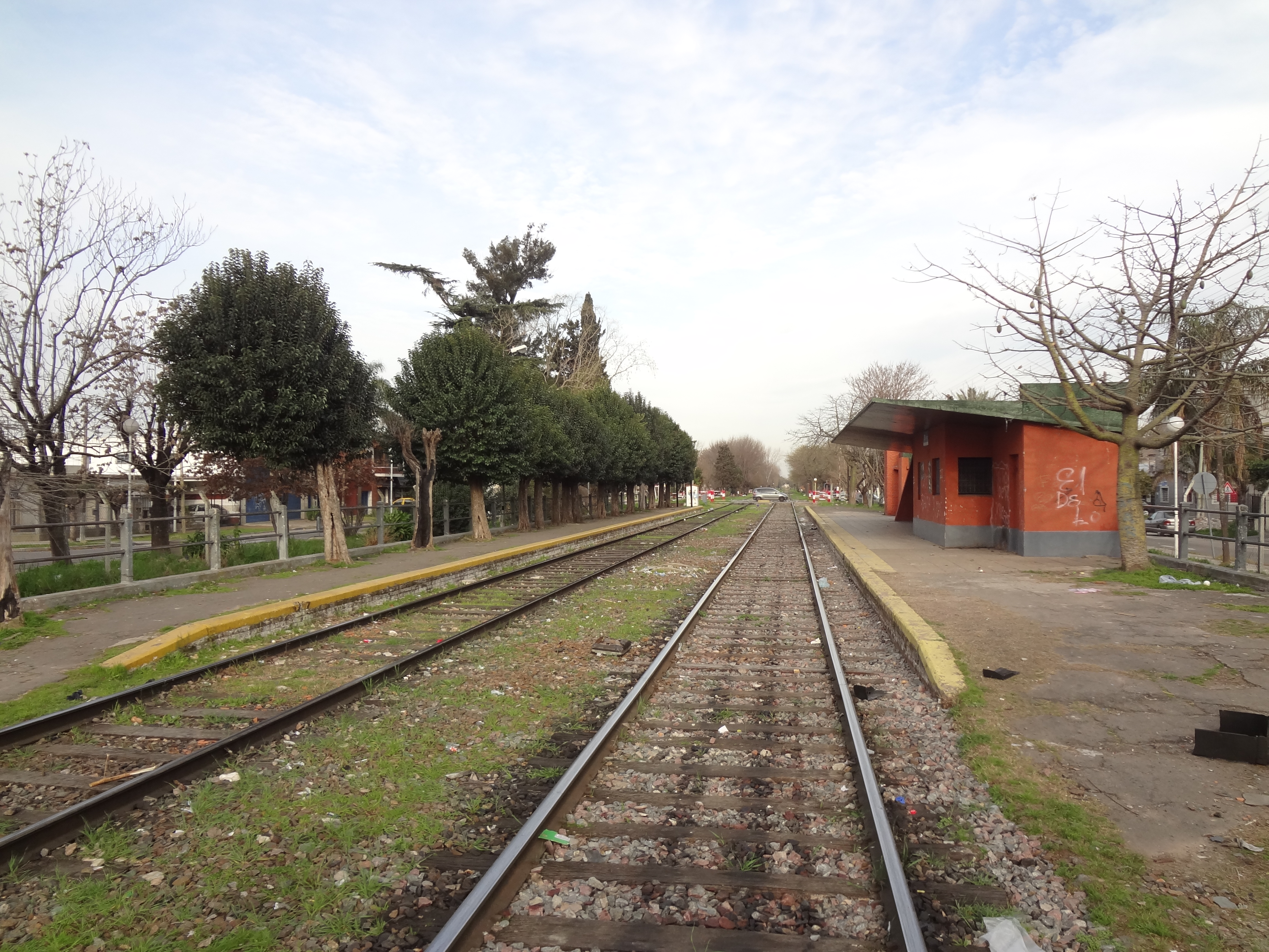 Estación Ing. Brian, Villa Luzuriaga, partido de La Matanza, Provincia de Buenos Aires